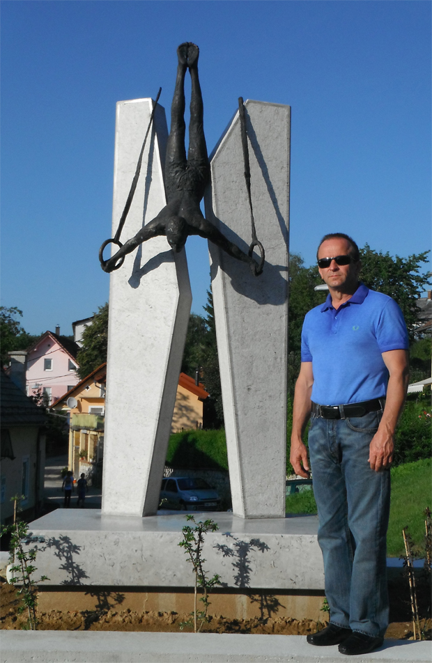 Srpski (latinica): Dr Dragan Đokanović pored spomenika jugoslovenskom gimnastičaru Leonu Štukelju u Novom Mestu, Slovenija.